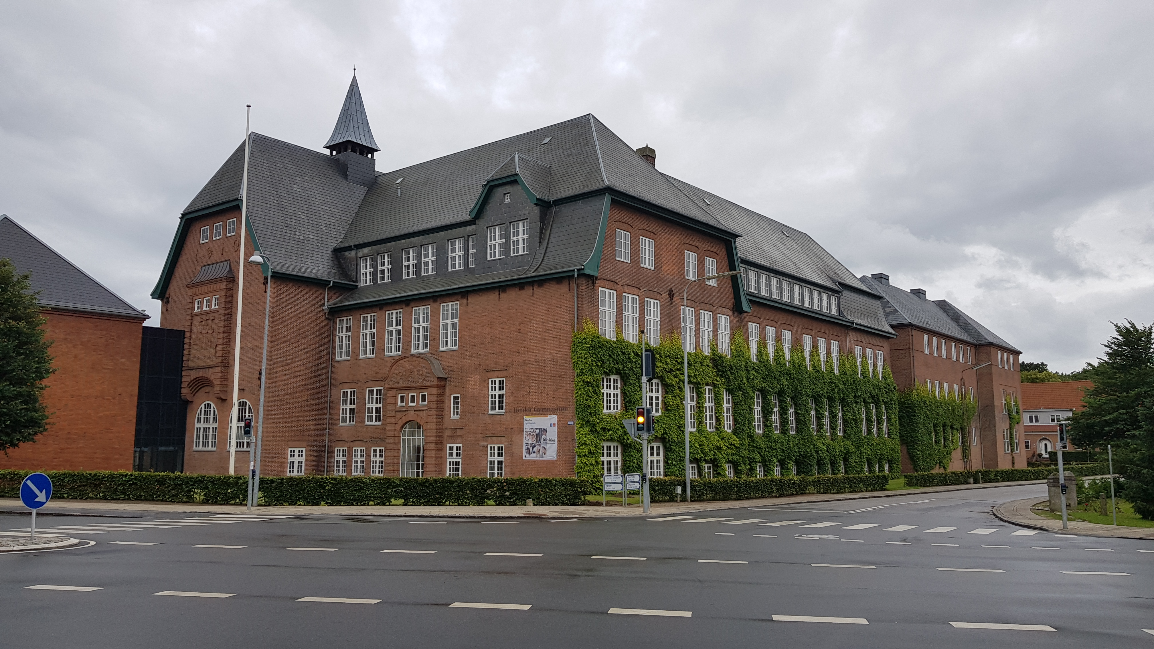 Tønder Gymnasium